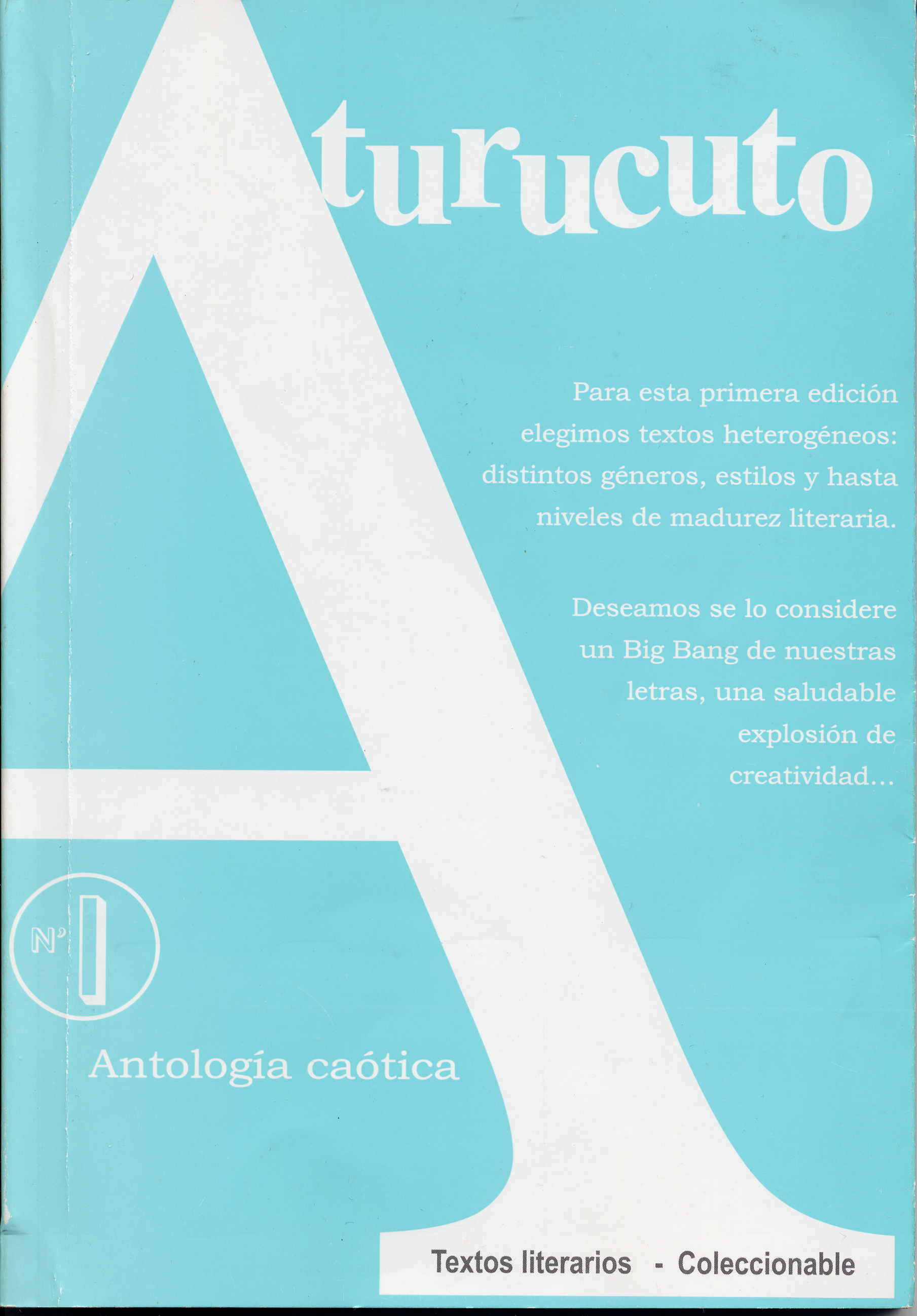 Tapa de la revista literaria de Tucumán, Argentina: Aturucuto, primer número, noviembre de 2009, ISBN 978-987-05-7713-3. Diseñador: Martín ZEVI.